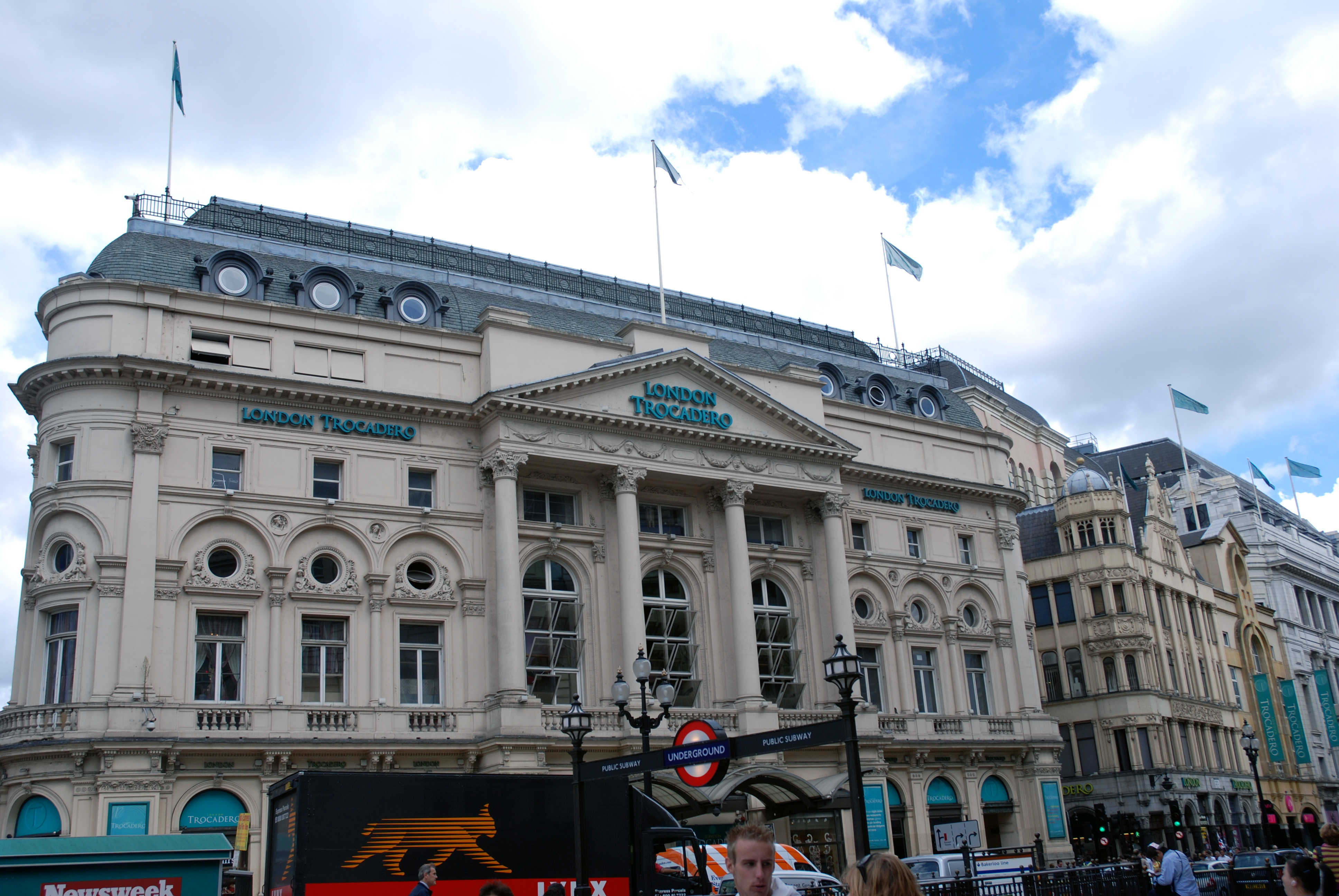 Trocadero